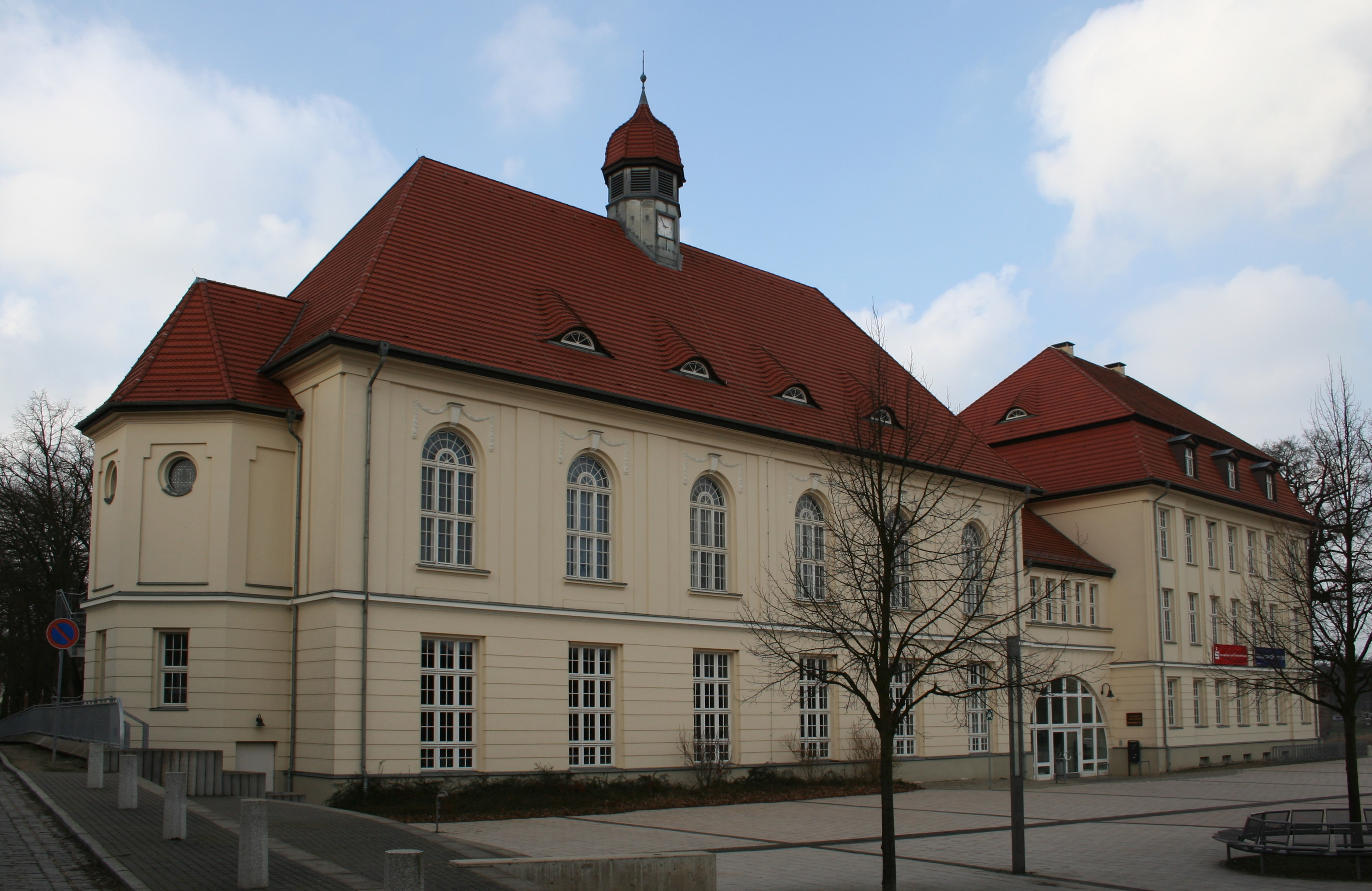 Schulgebäude des Gymnasium Carolinum am Glambecker See in Neustrelitz.